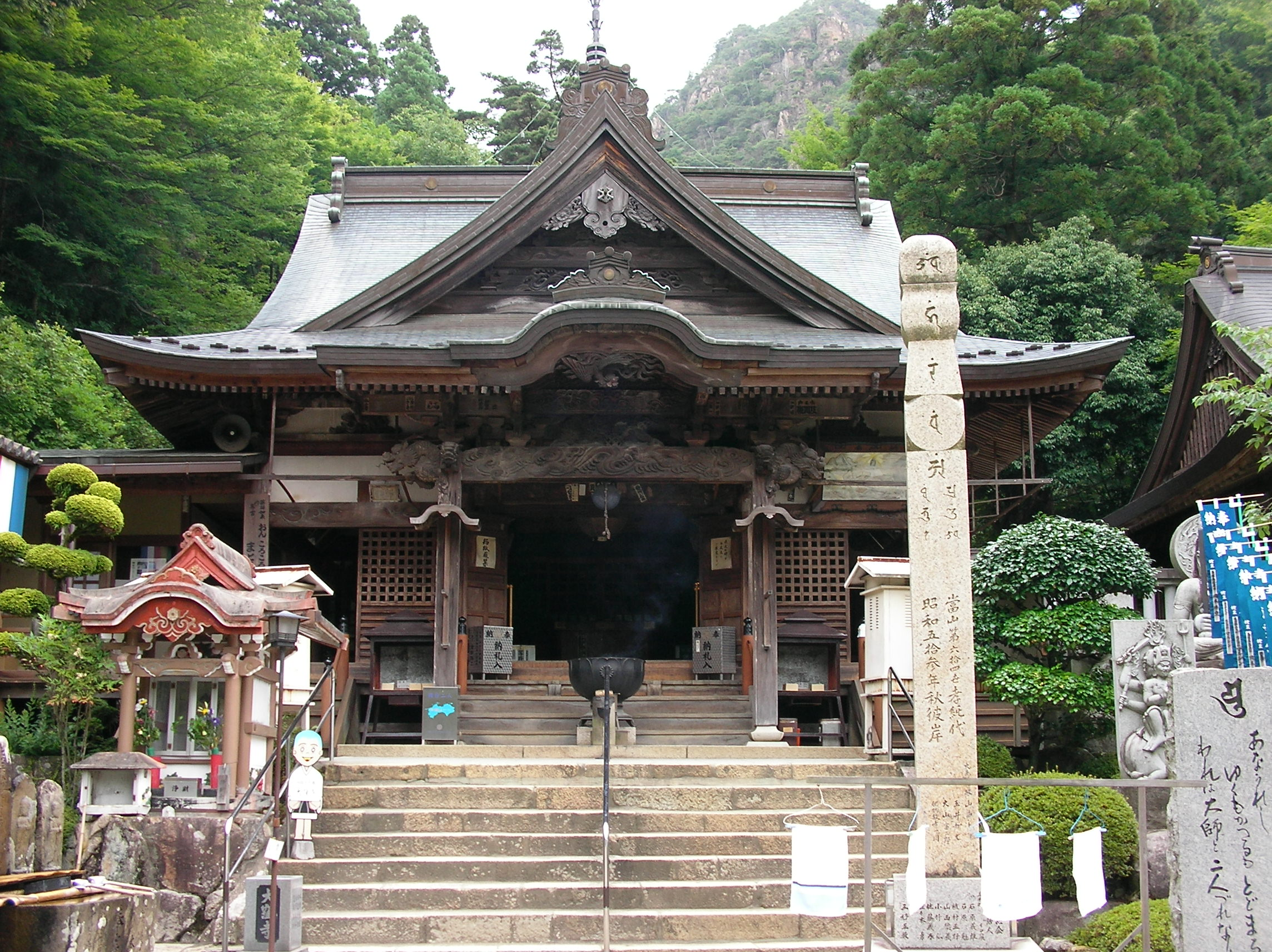 Iozan-okuboji-main